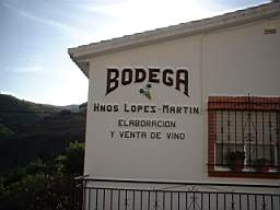 Bodegas Hermanos Lopez-Martin